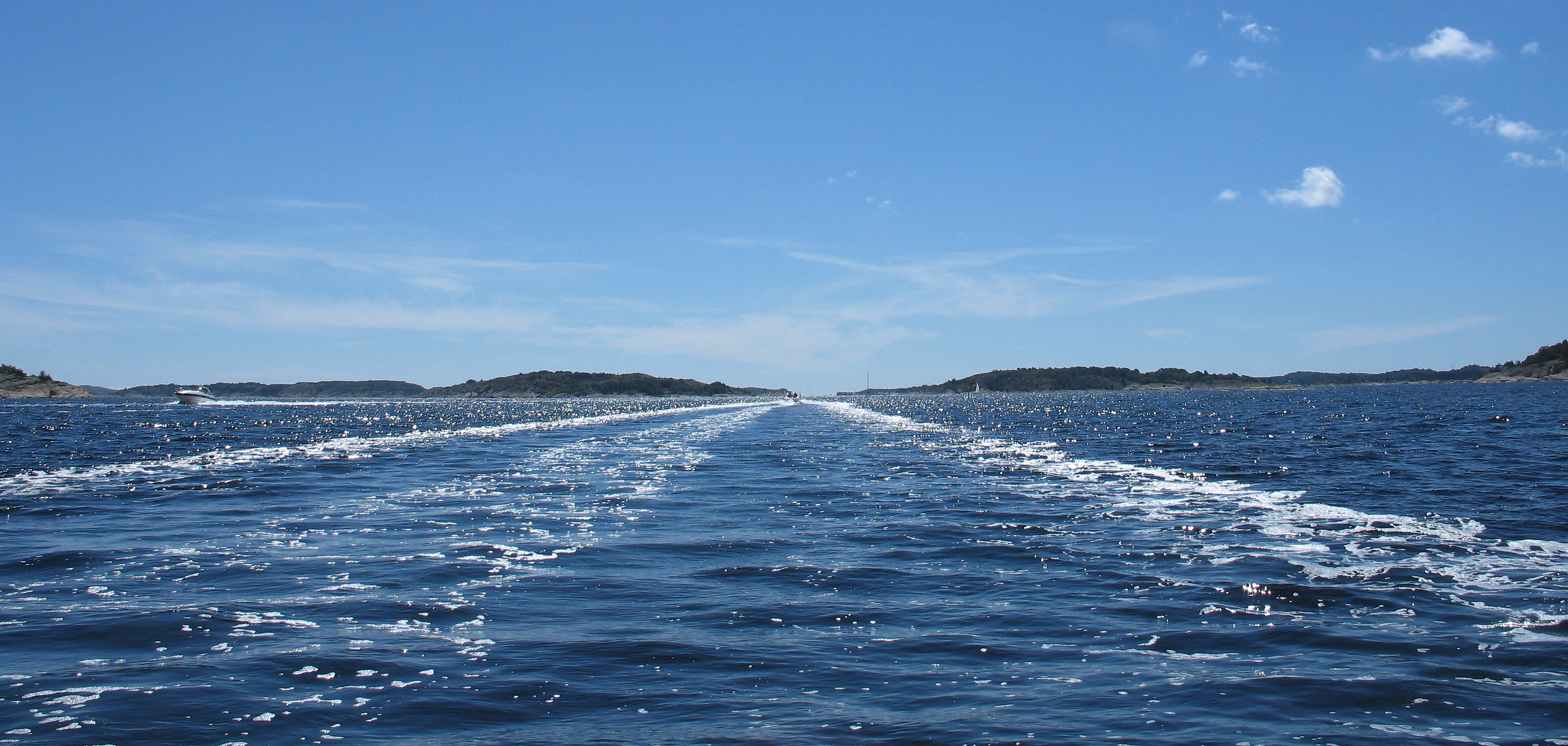 Sandøsundleden på Tjømes østside